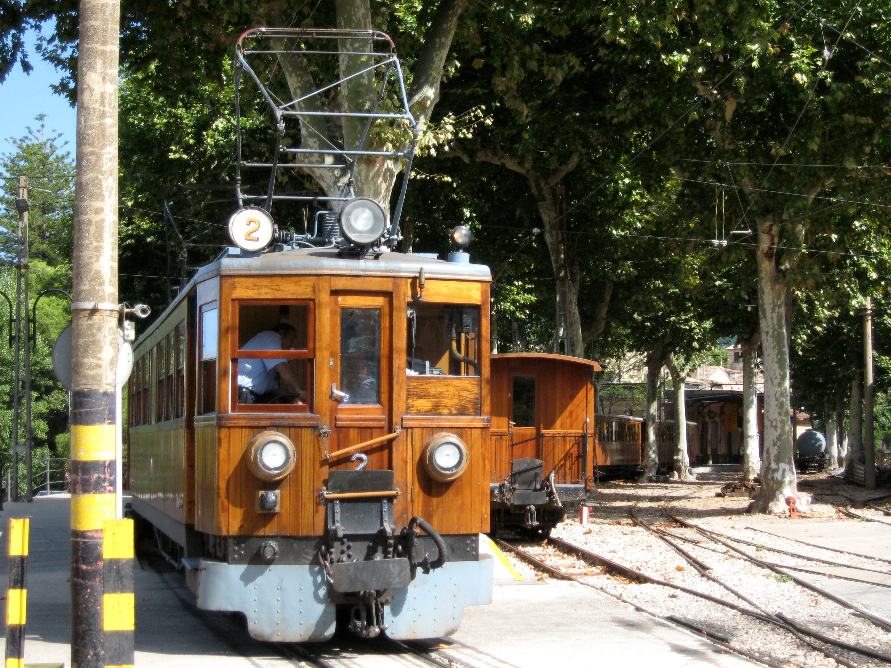 Bahnhof von Sóller, Mallorca, Spanien